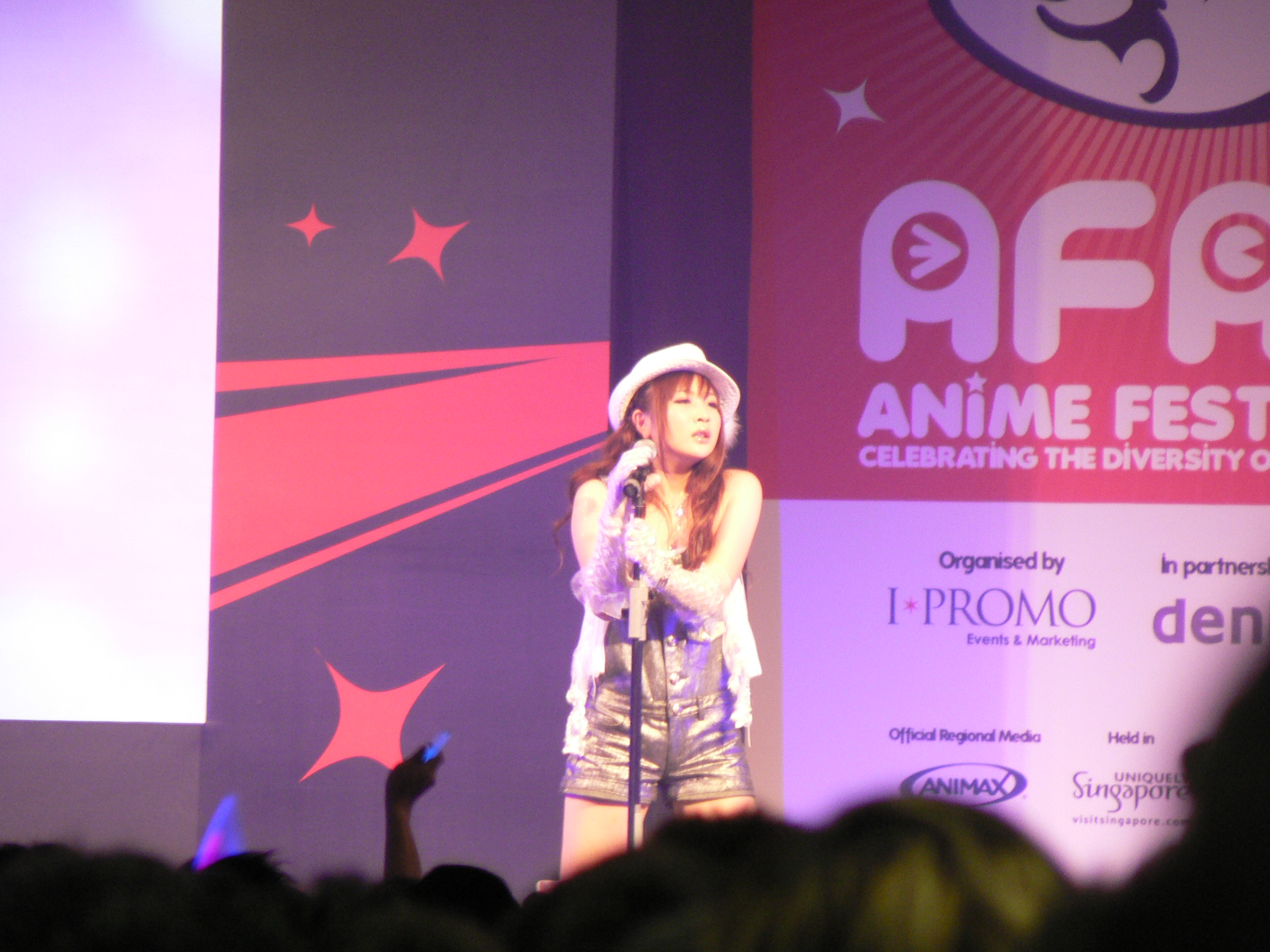 May'n 中林 芽依